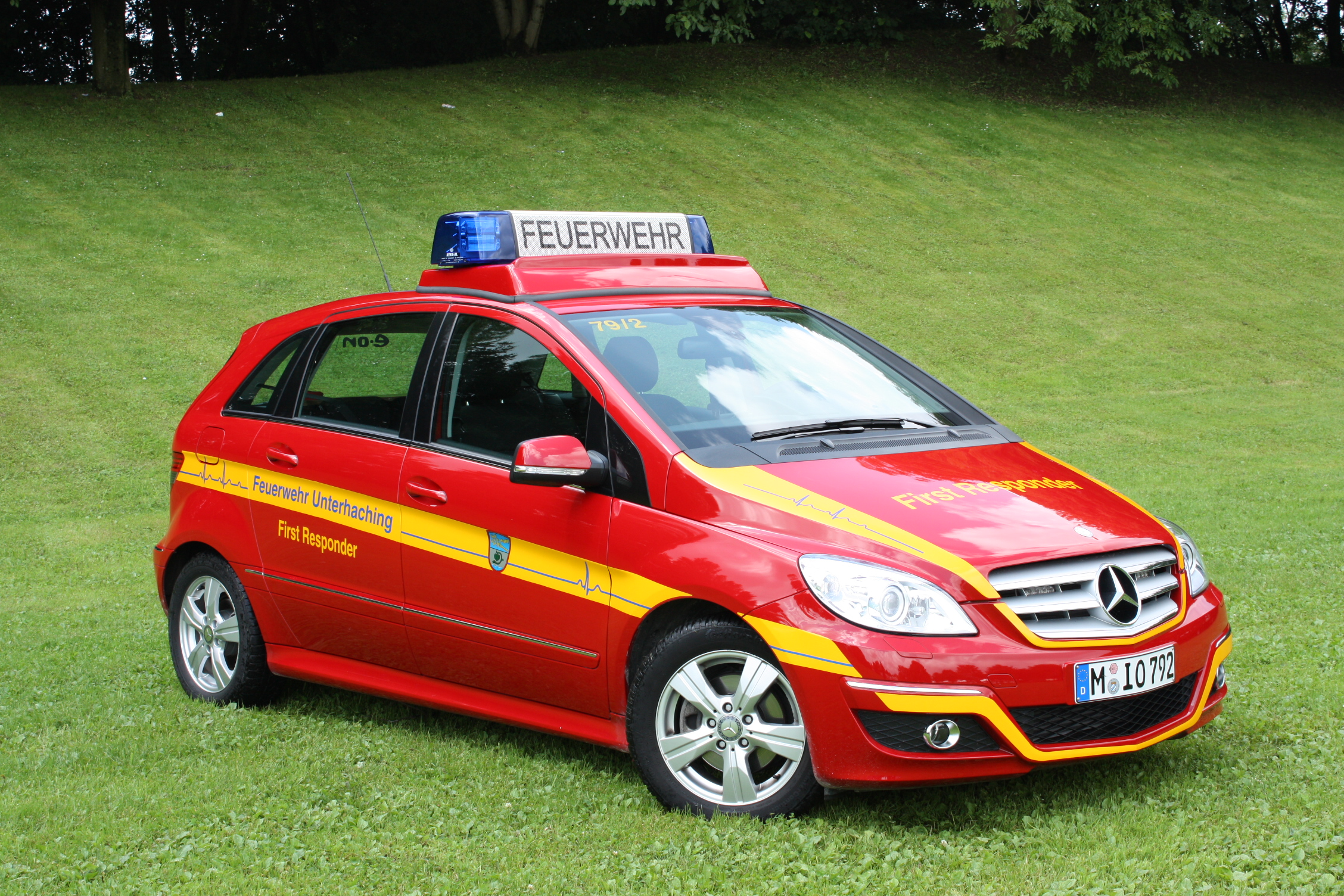 Eines der beiden First Responder Fahrzeuge der Feuerwehr Unterhaching (Lkr. München)